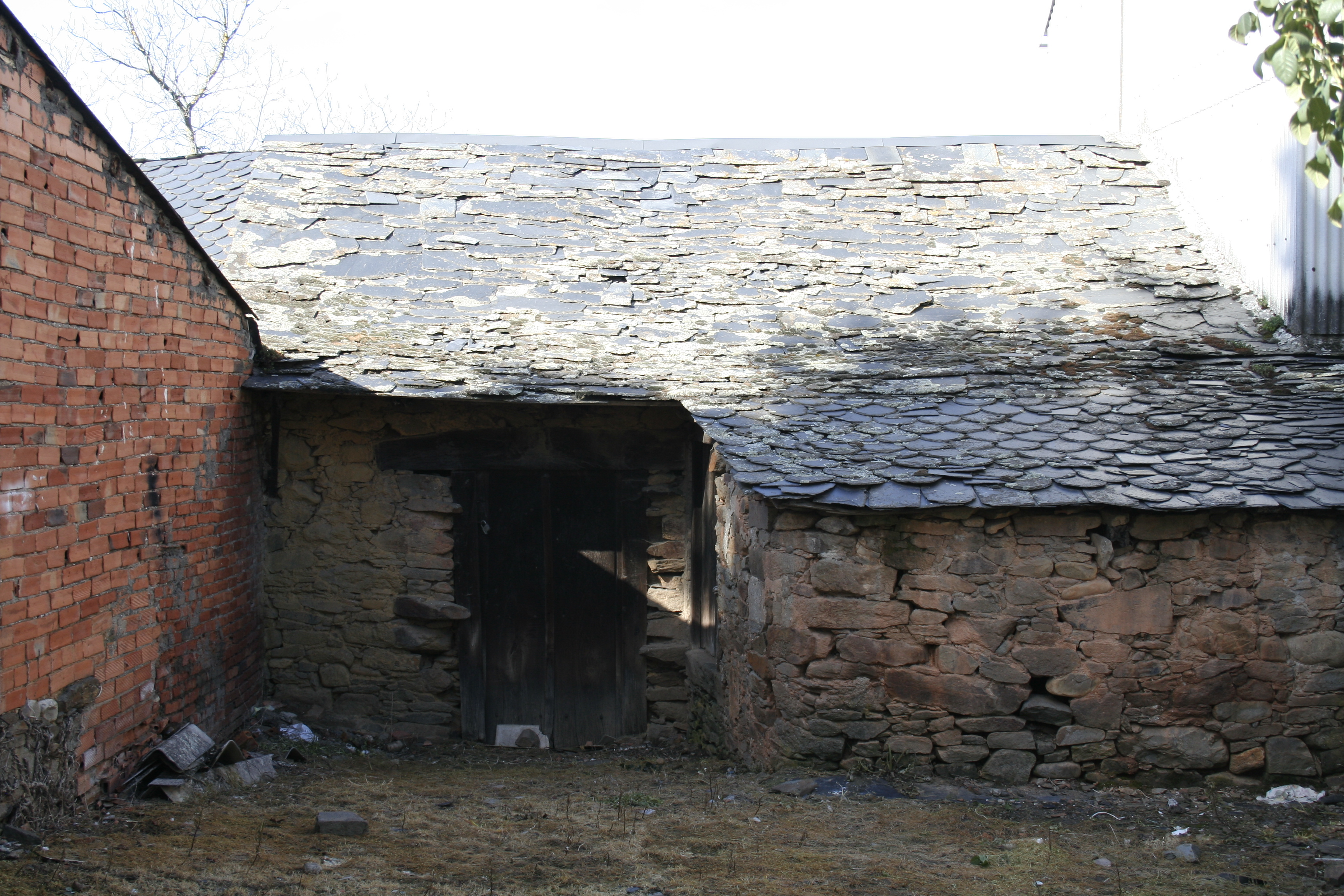 Ejemplo de la arquitectura popular (casa de lousa) en Albares de la Ribera